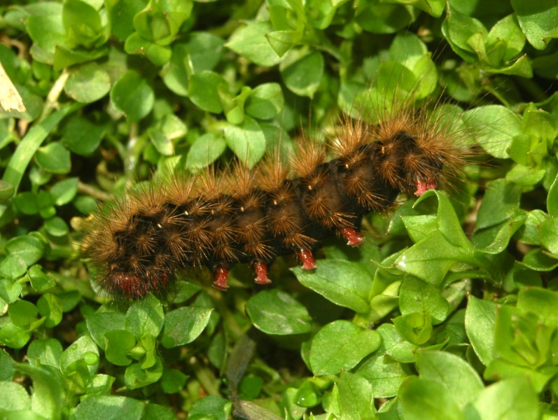 Epicallia villica - Caterpillar